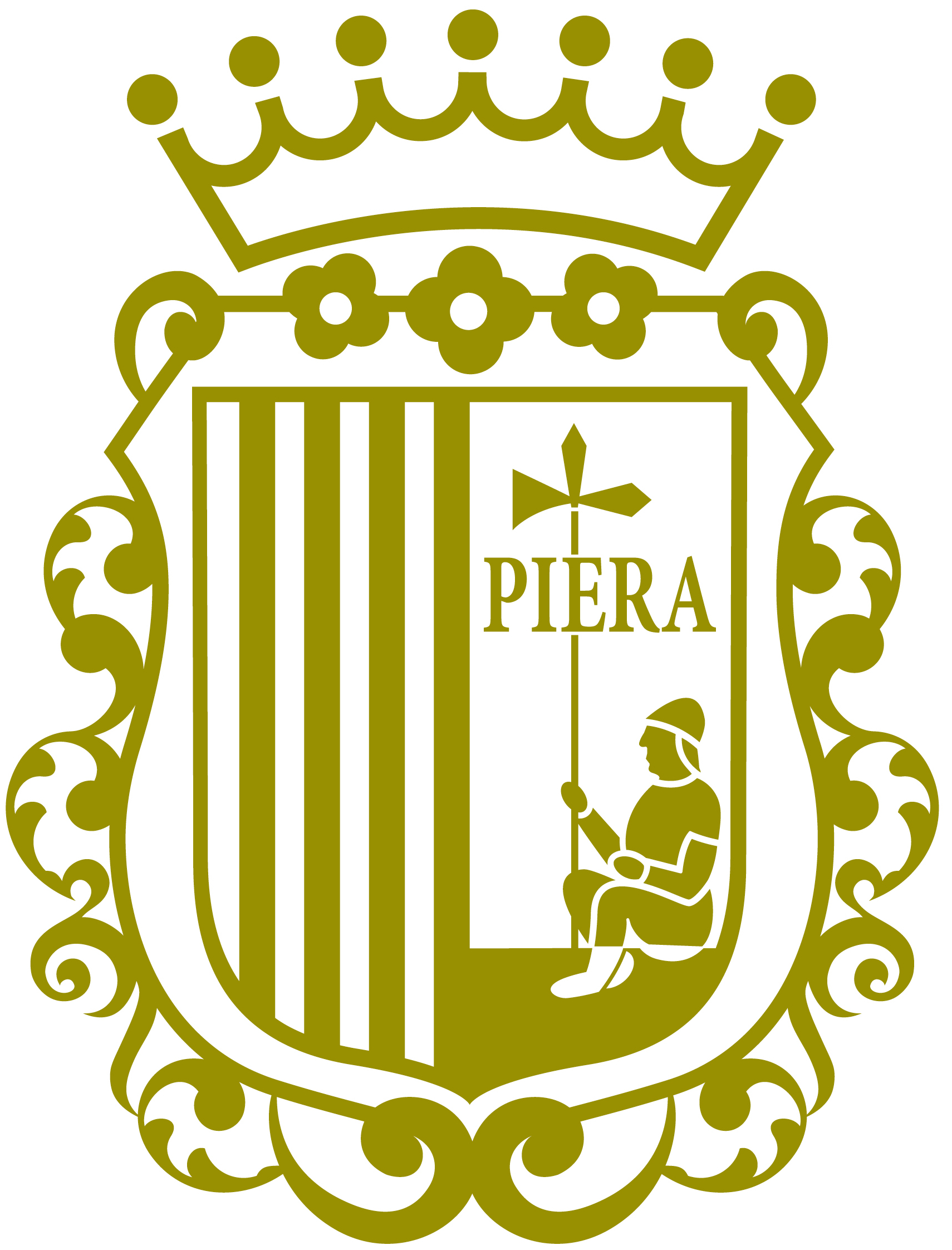 Escut Vila de Piera